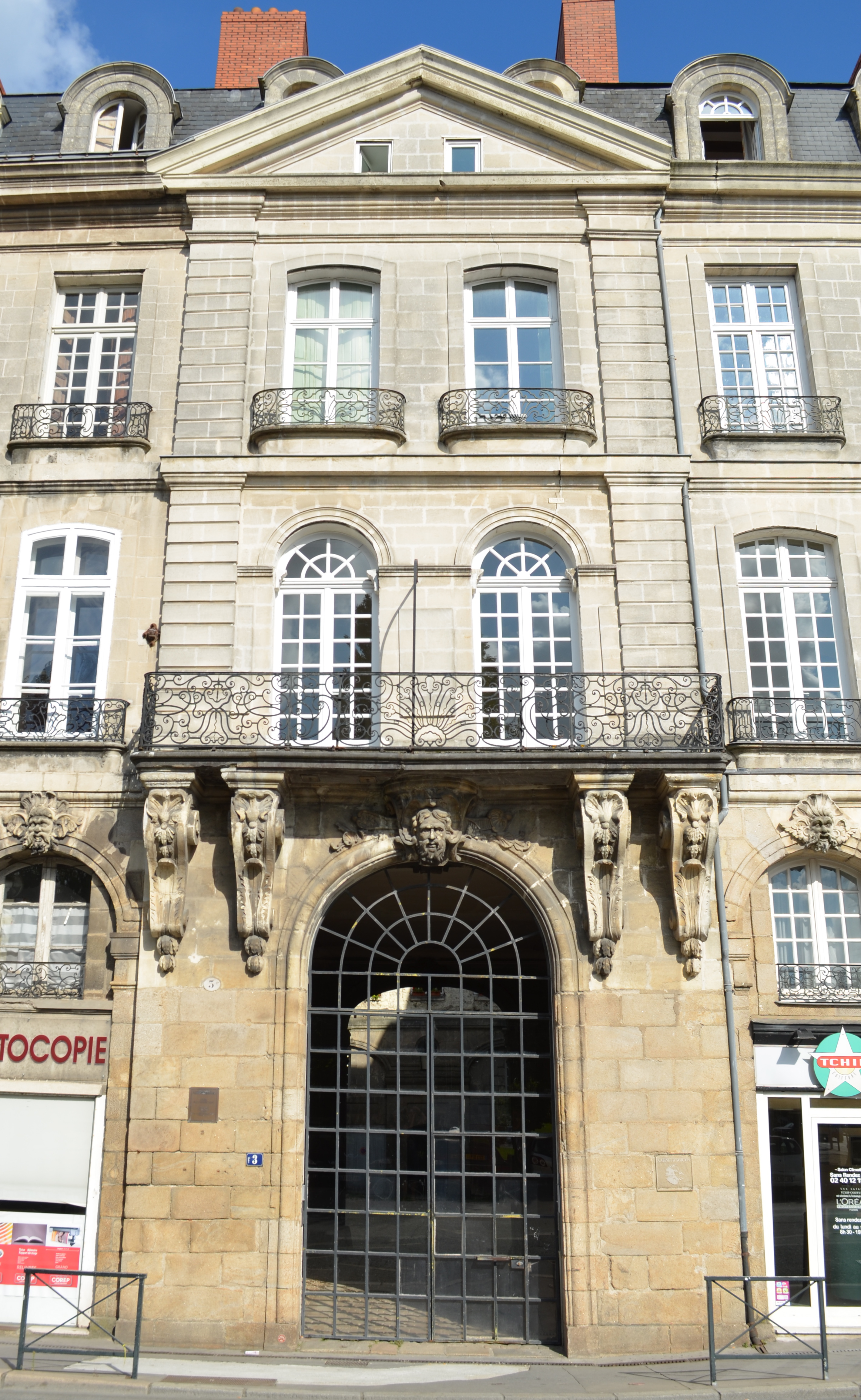 Vue de la façade principale de l'hôtel Villetreux situé au 3 place de la Petite-Hollande, façades latérales sur la rue Kervégan et le quai Turenne - Nantes. .